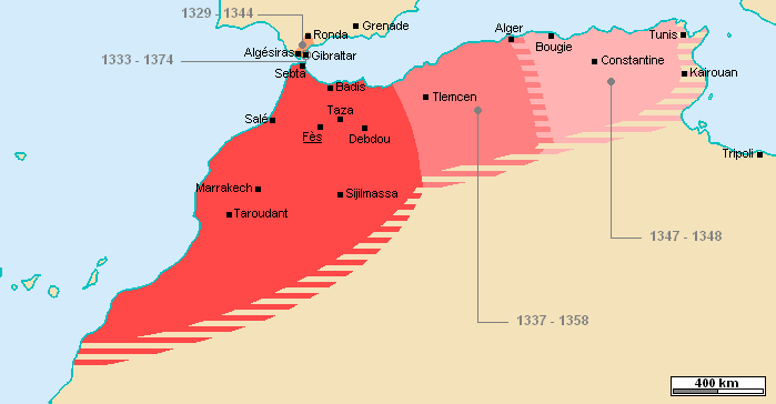 Carte décrivant les étapes de l'extension de l'Empire mérinide au 14e siecle